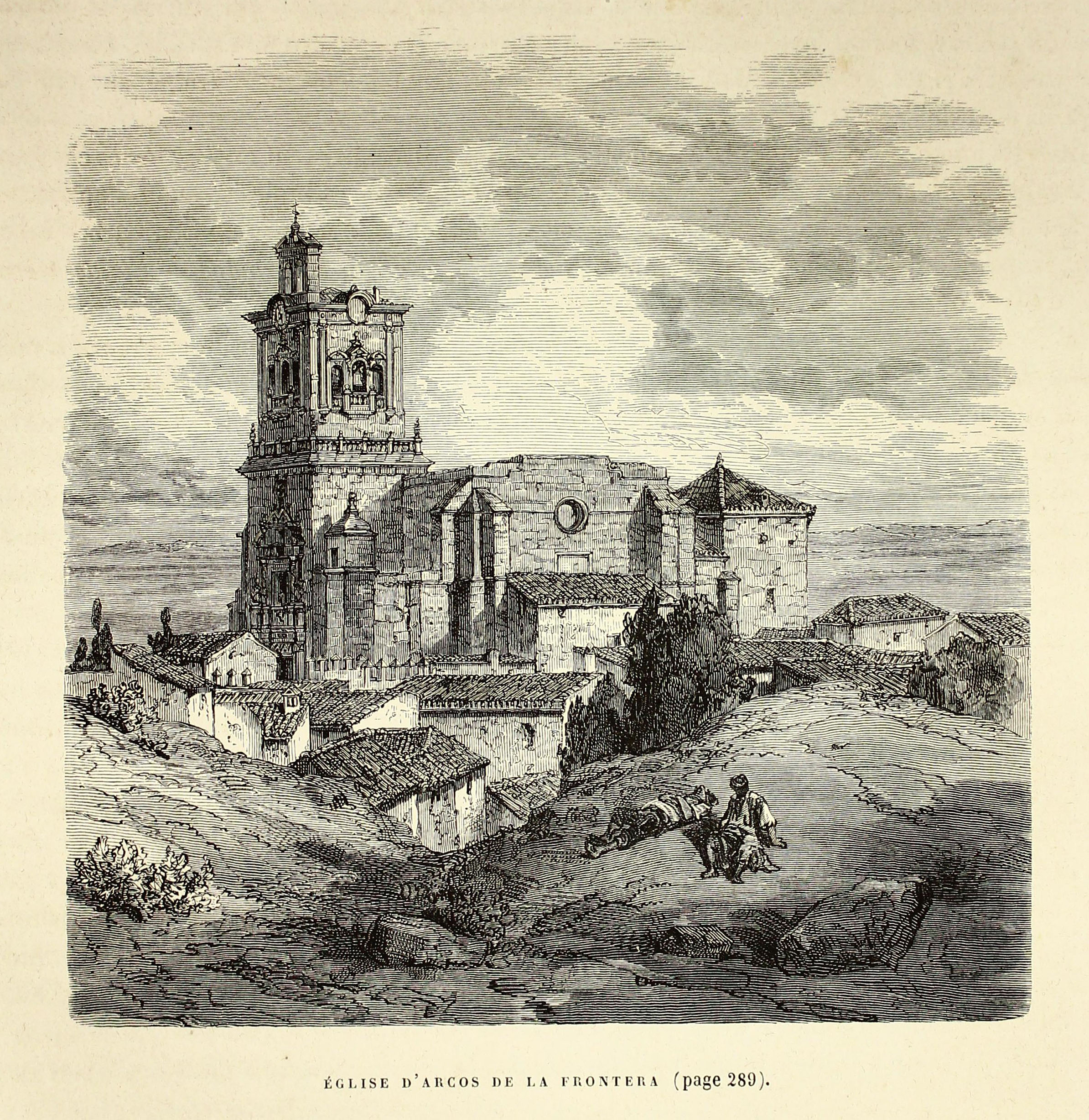 Title: Église d'Arcos de la Frontera Autor: Davillier, Jean Charles, barón, 1823-1883 Descripción bibliográfica: L'Espagne / par Le Baron CH. Davillier ; ilustrée de 309 gravures dessinées su bois par Gustave Doré. - Paris : Librairie Hachette, 1874. - 799 p. : il. Materia: España- Geografía Materia: España- Usos y costumbres Ilustrador: Doré, Gustave, 1832-1883 Editor: Libreria Hachette Lugar de impresión: Francia, París Localización: Libro completo